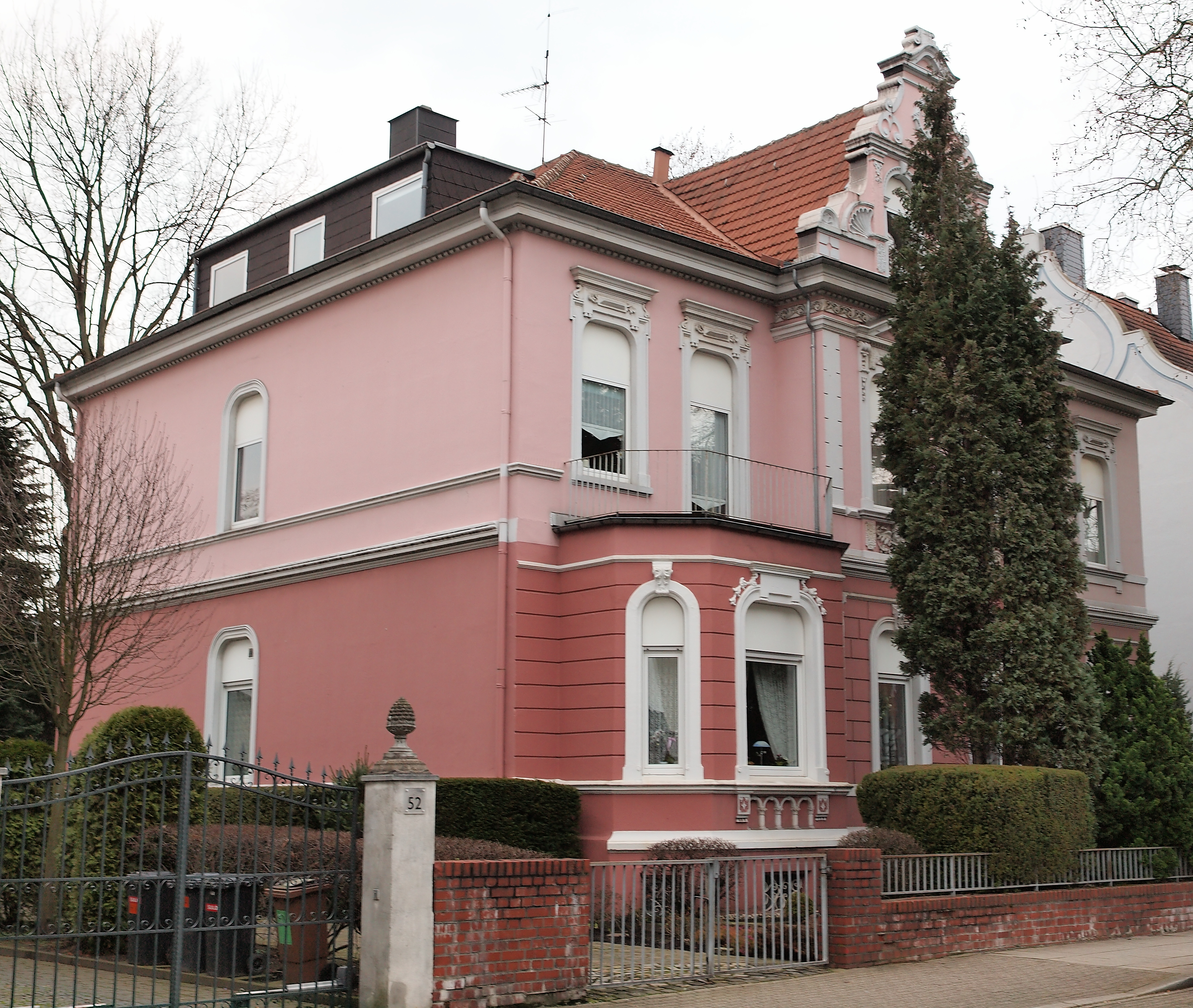 Wohnhaus in Herne Mitte, Bochumer Straße 50, Denkmal This is the photograph of an architectural monument. It is part of the list of cultural monuments of Herne, no. 11